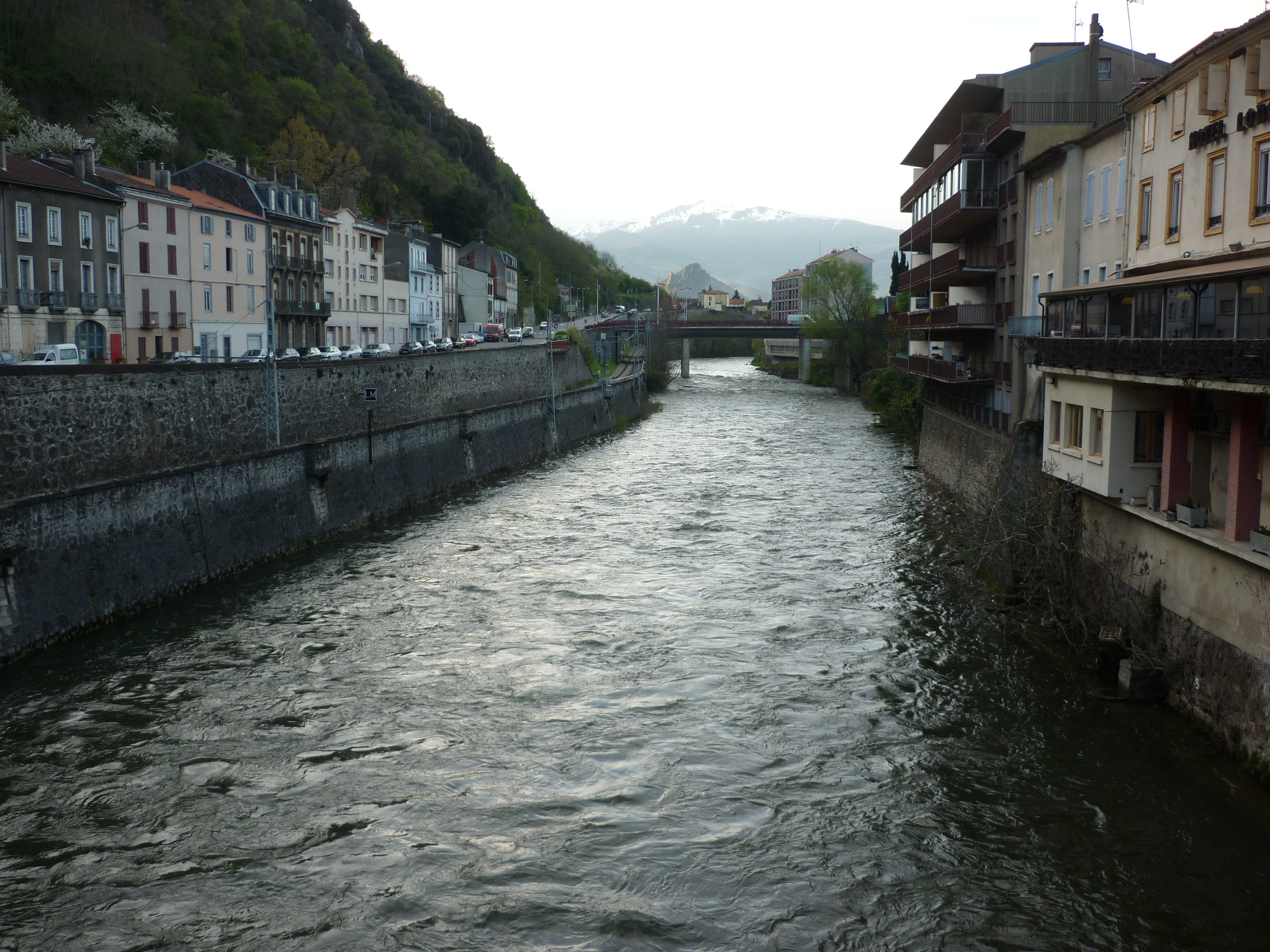 La rivière Ariège dans la traversée de Foix (Ariège, Pyrénées)